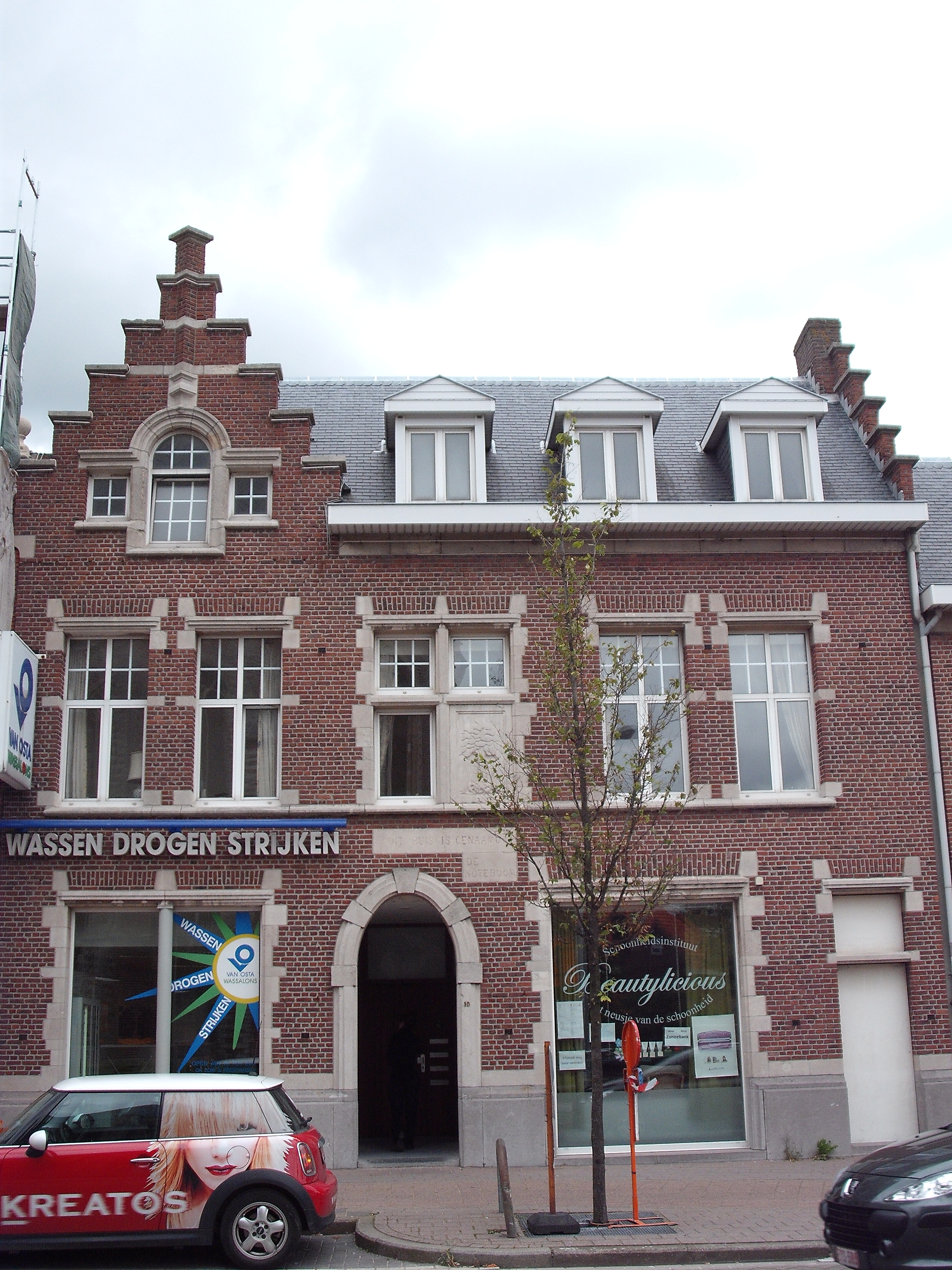 Ekeren (Antwerpen), Markt nr.10. Huis genaamd De Noteboom, n.o.v. architect Alfons Van Braekel uit 1925.